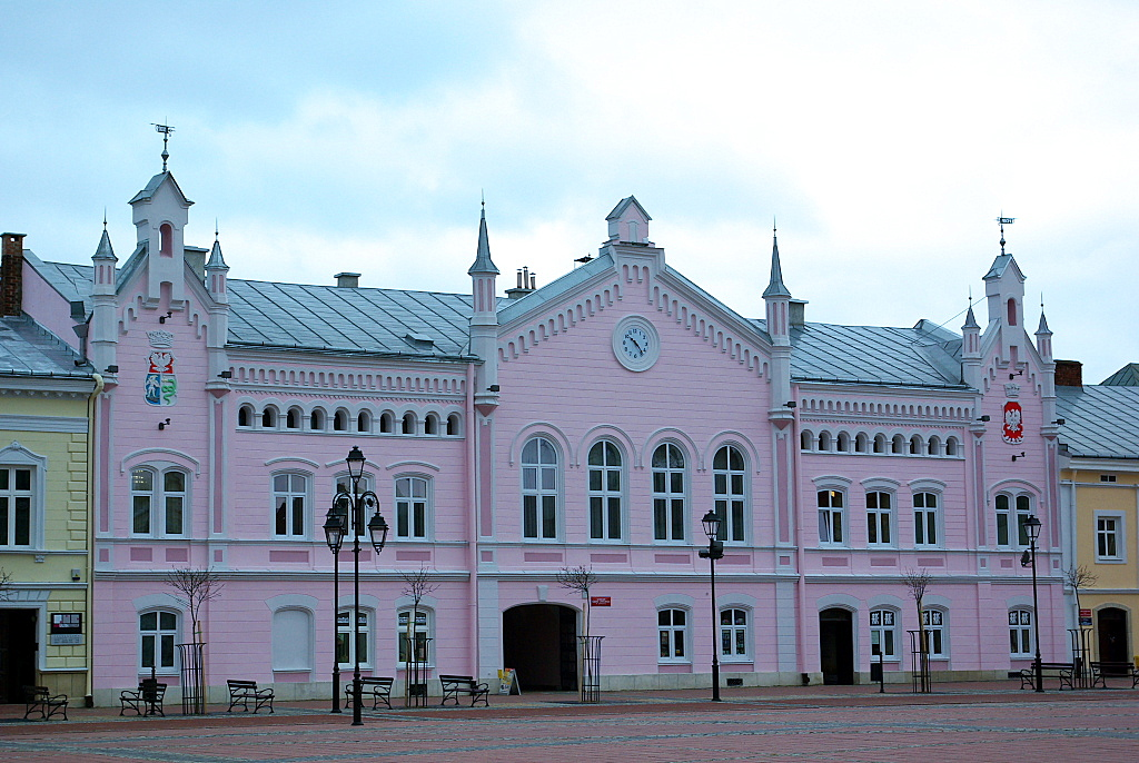 Ratusz 16 Sanok